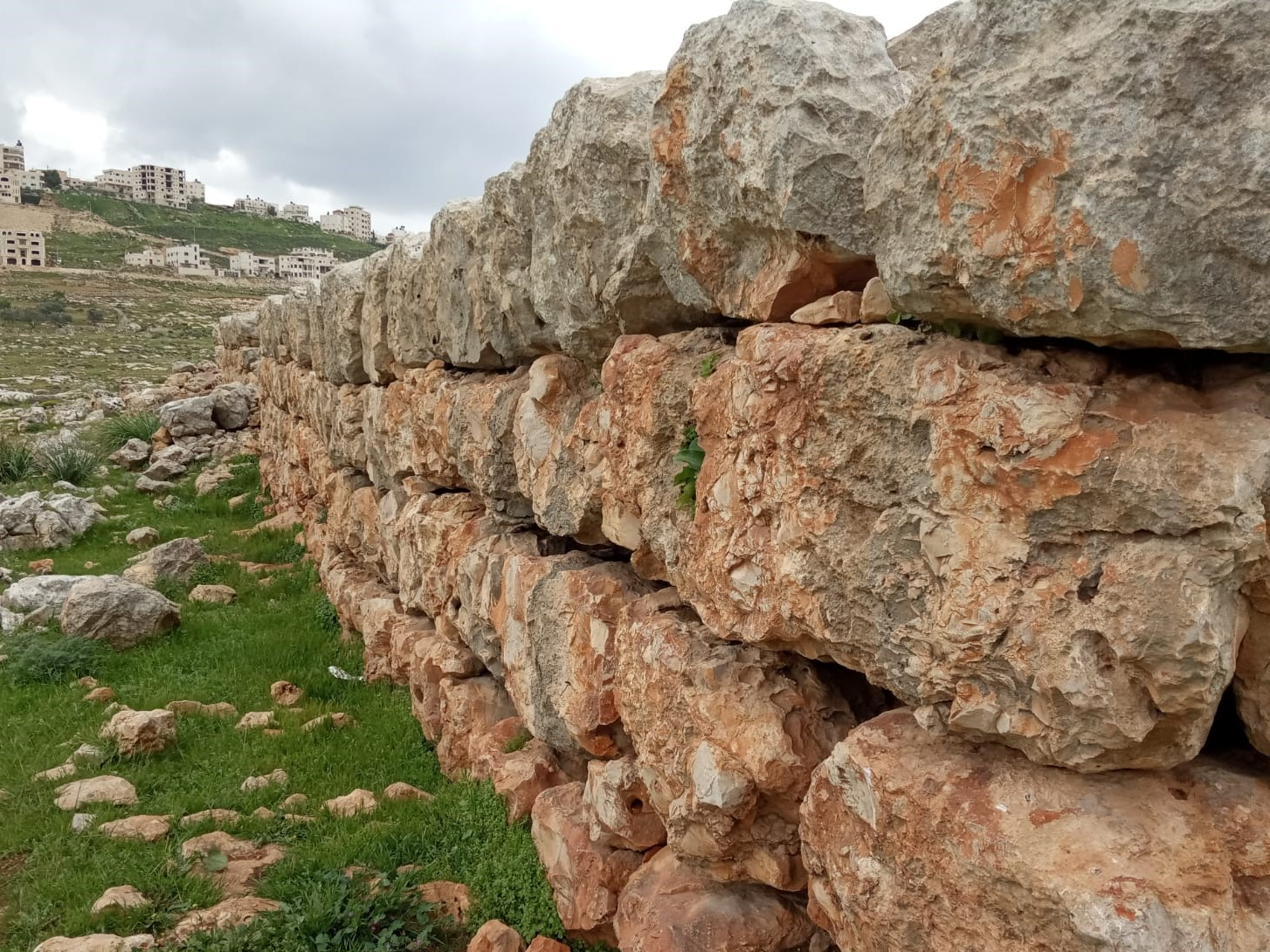 קבר בני ישראל מרץ 2019